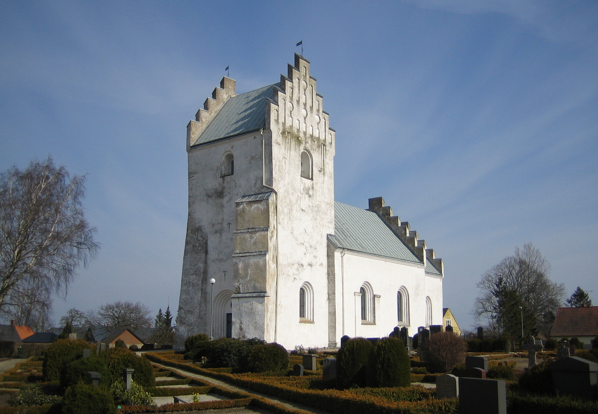 Järrestads kyrka in Skåne, Sweden